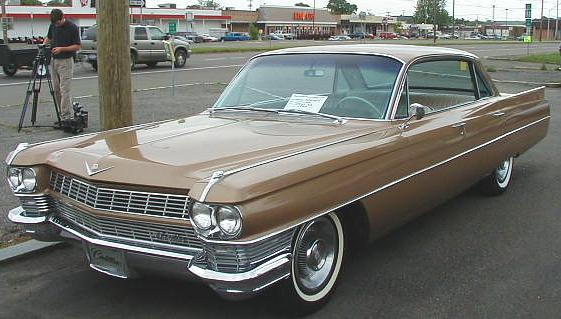 Vestal NY